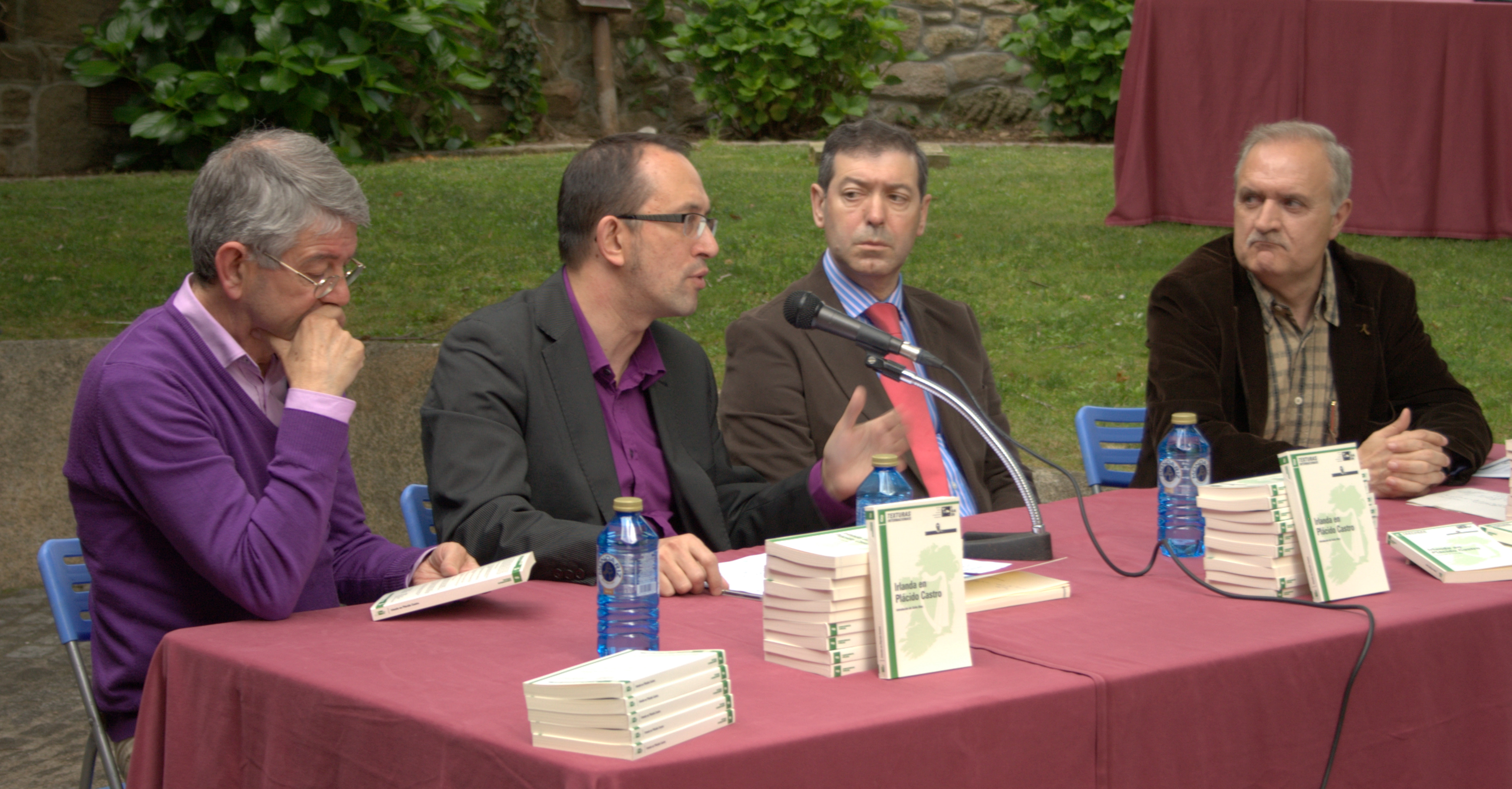 Event of Placido Castro Fundation, in Cambados. Presentation of a book with articles of Placido Castro, Galician translator.